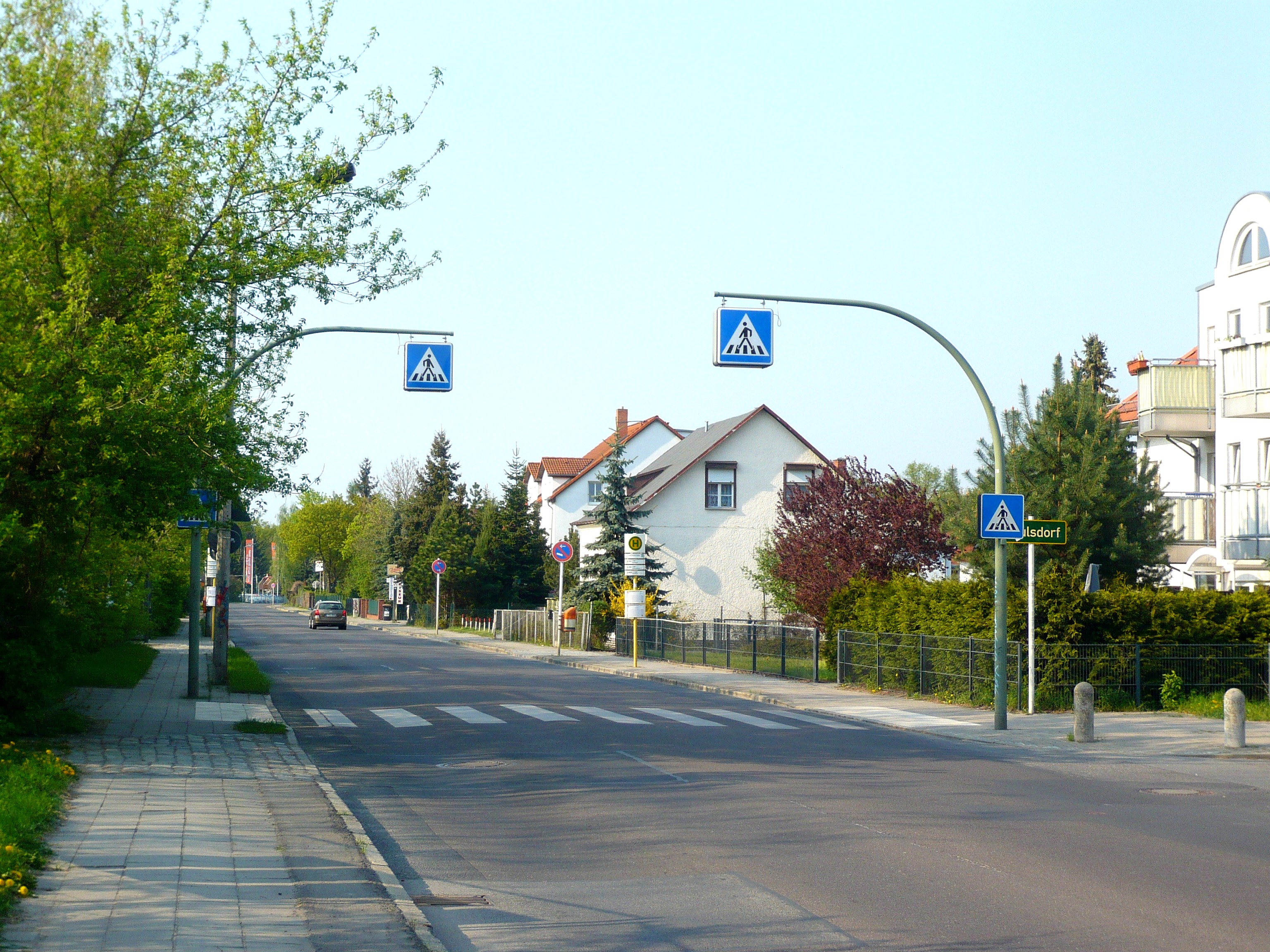 Berlin-Kaulsdorf, Kaulsdorfer Str.